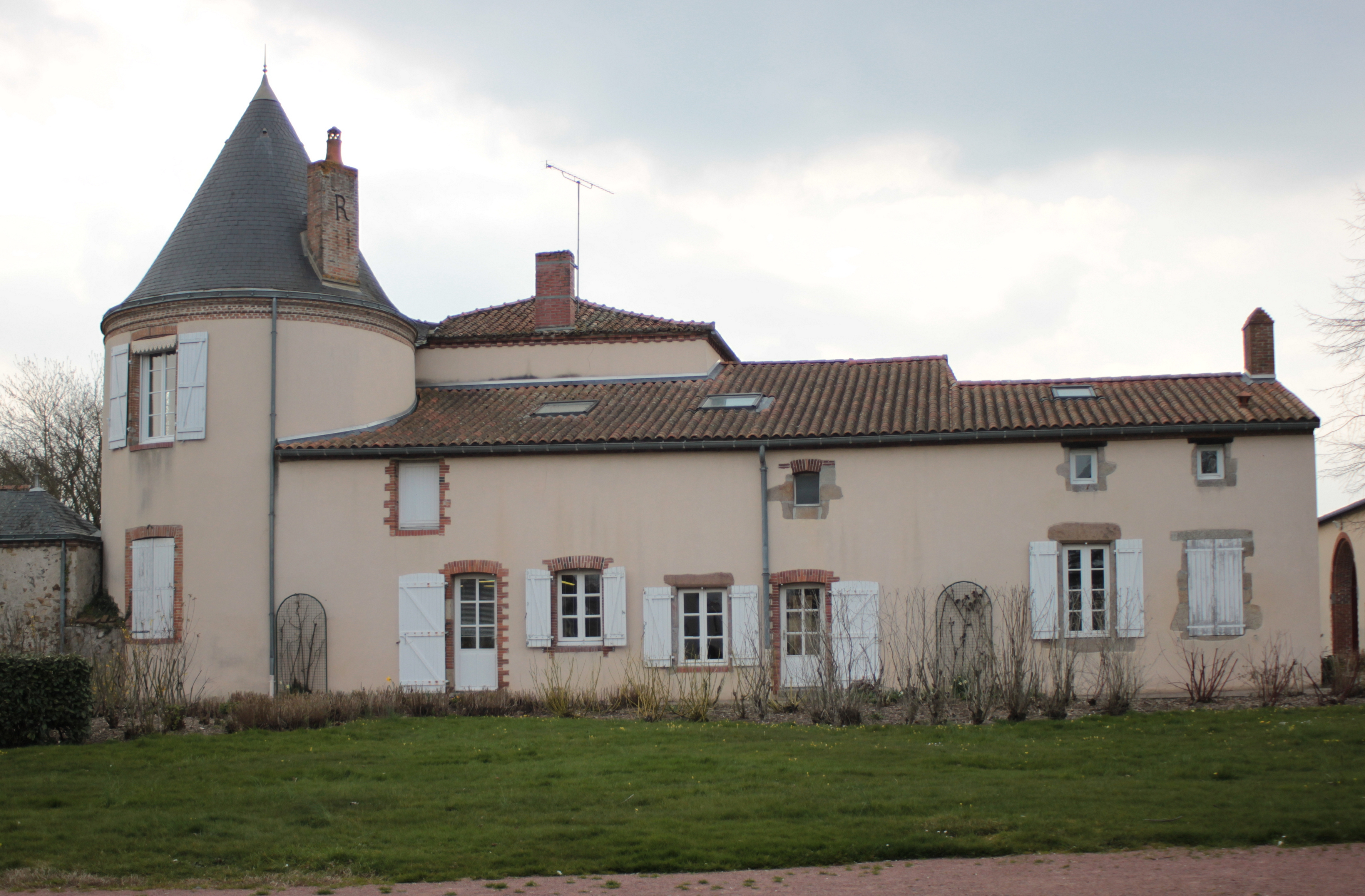 Mairie, lieu-dit le Landreau, Fr-49-Saint-Léger-sous-Cholet.